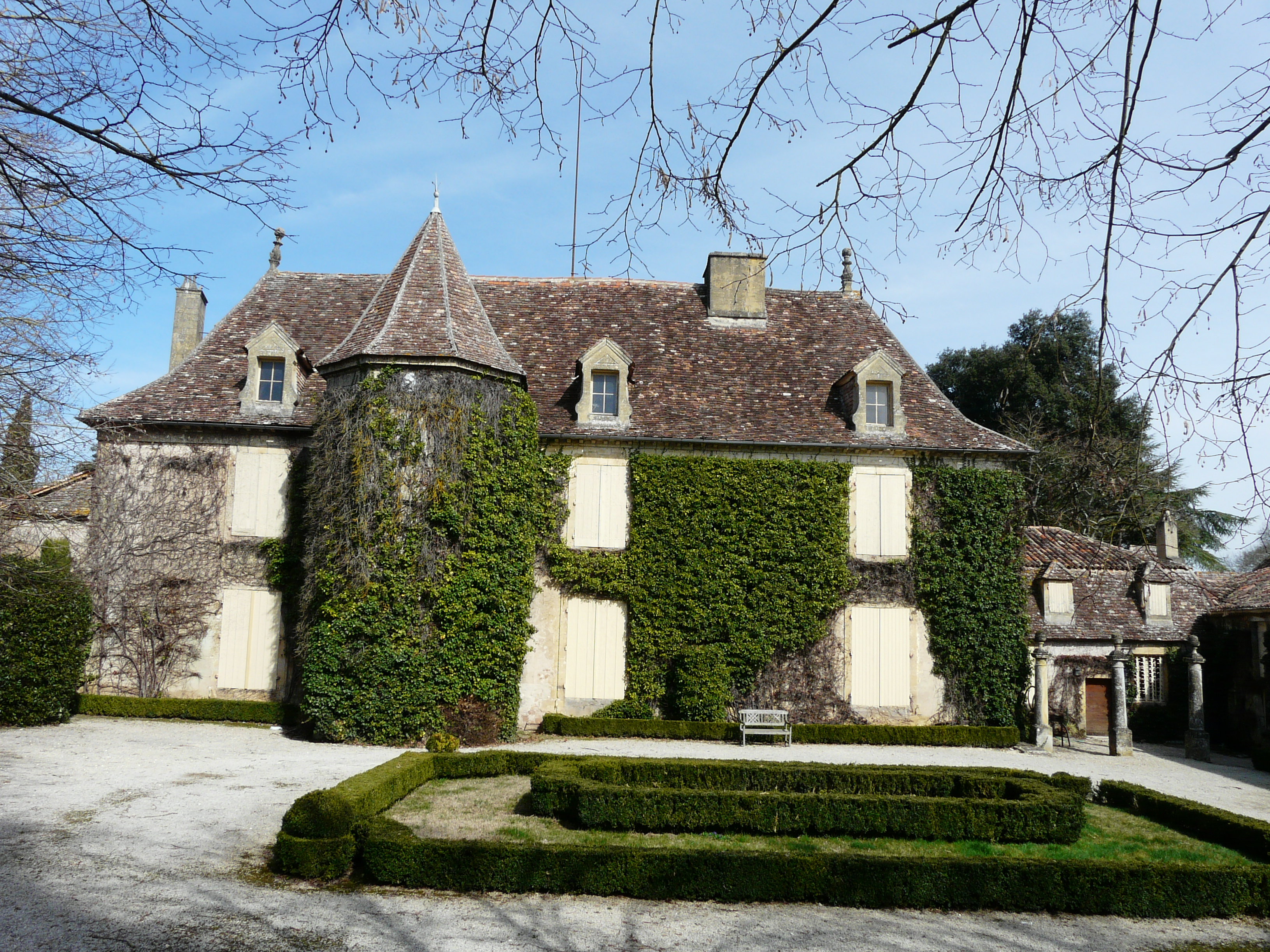 Le château de Faux, Dordogne, France.